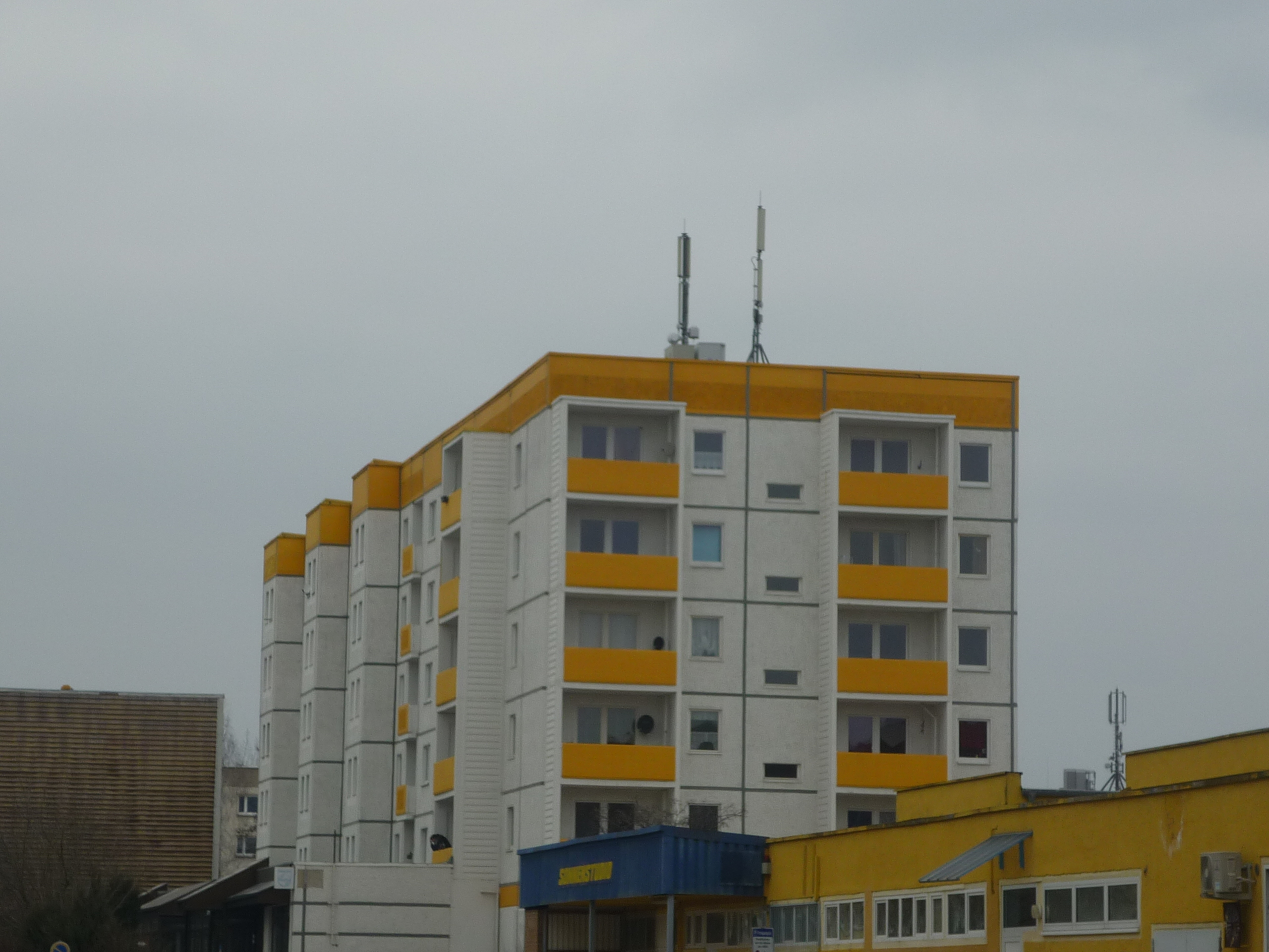 WOBLST